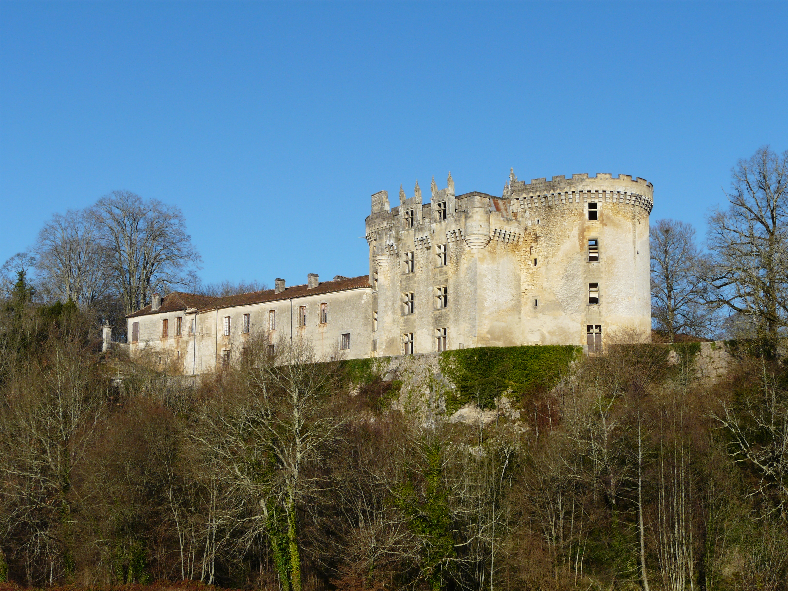 Le château de la Chapelle-Faucher, Dordogne, France Object location45° 22′ 10″ N, 0° 45′ 04″ E